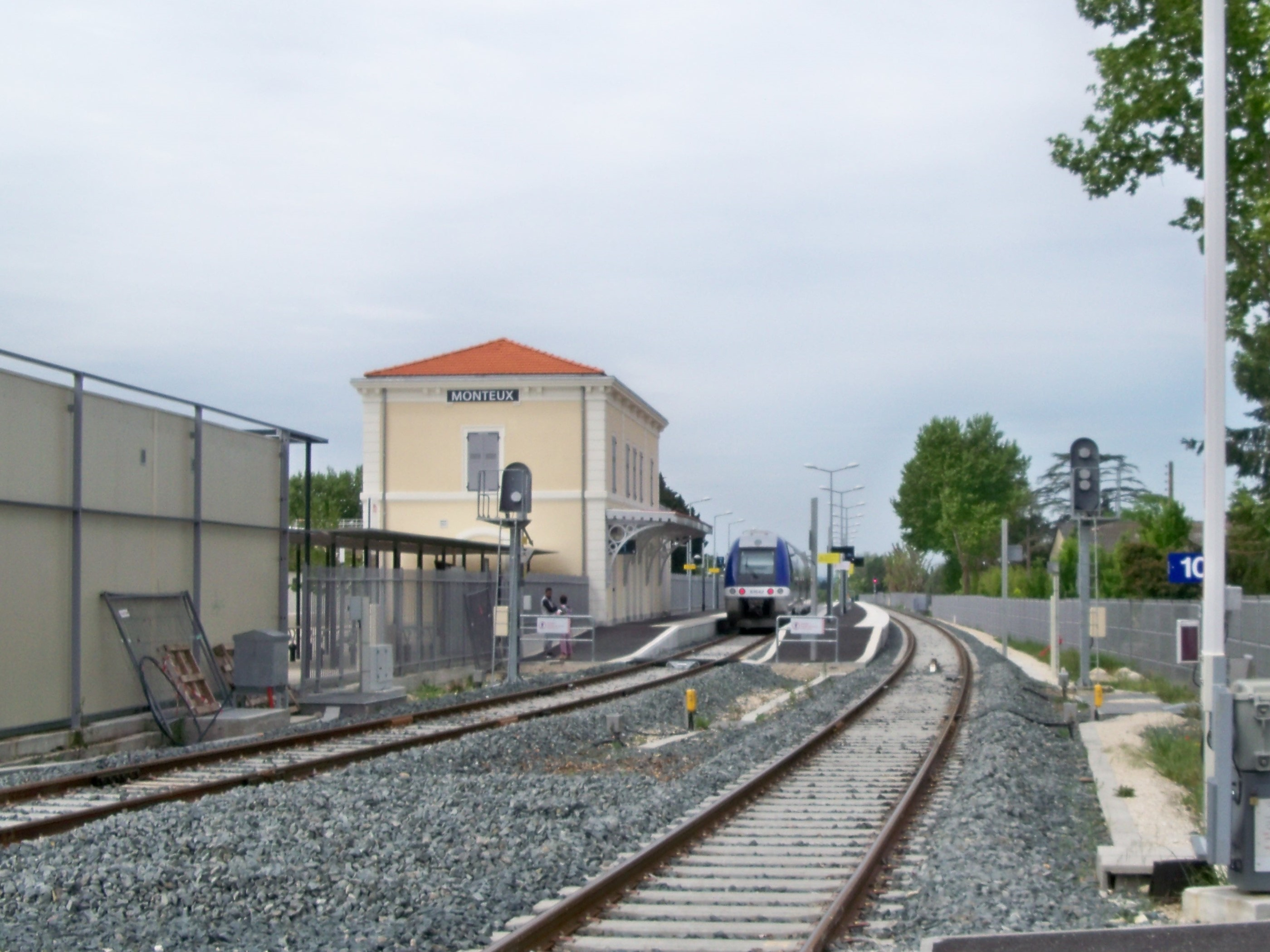 arrivée d'un train en gare de Monteux